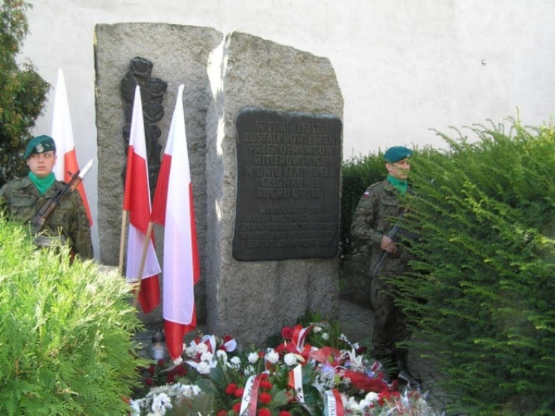 Przasnysz, 2012r. Pomnik członków ruchu oporu